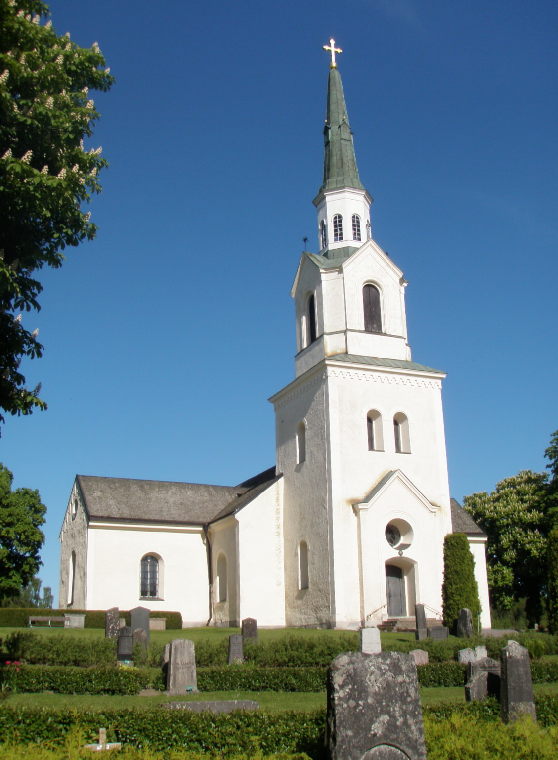 Östra Stenby kyrka.